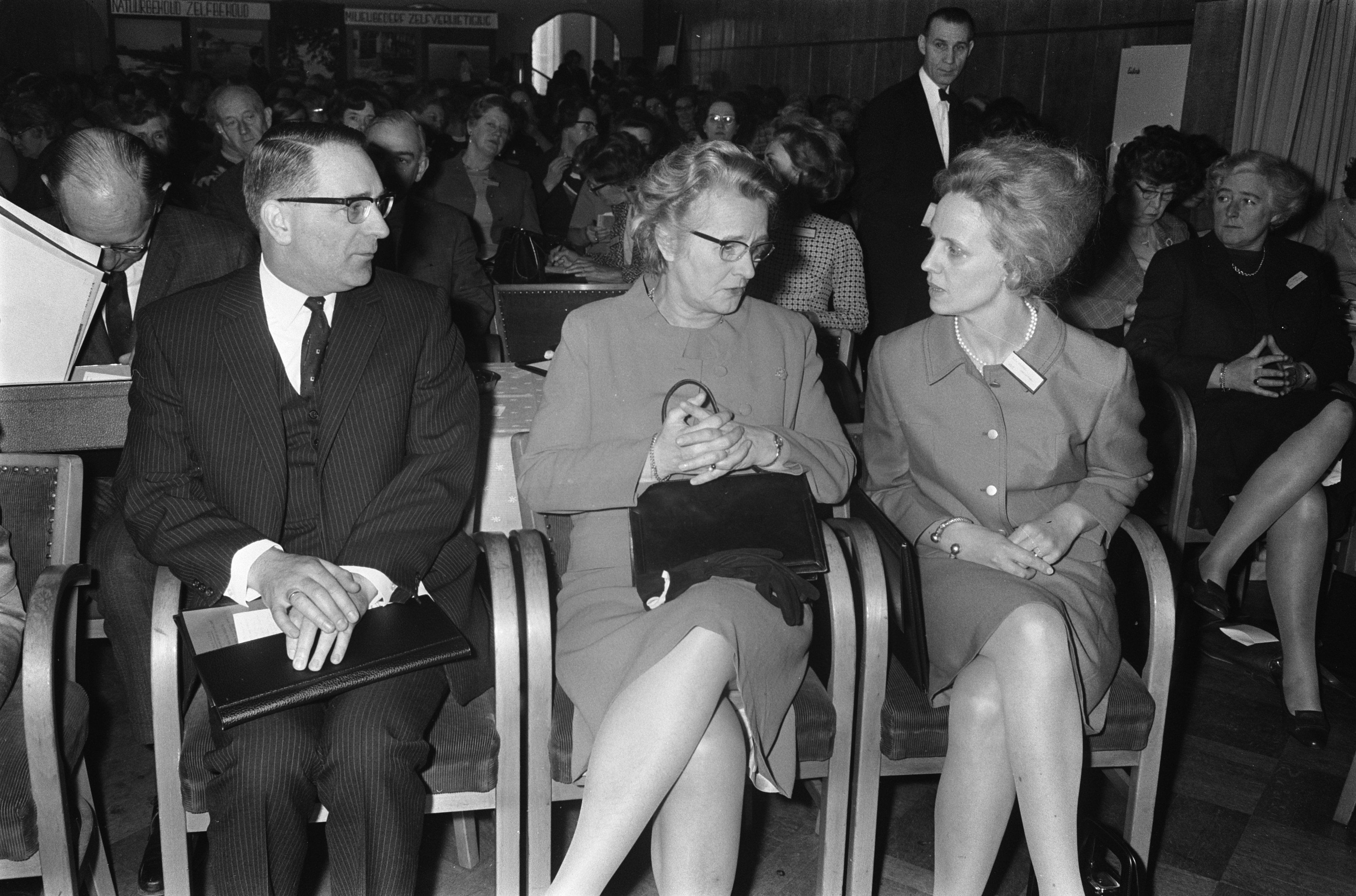 Collectie / Archief : Fotocollectie Anefo Reportage / Serie : [ onbekend ] Beschrijving : Minister dr. M. A. M. Klompe opent kadercursus over milieuverontreiniging te Utrecht. Professor dr. K. H. Voous , voorz. Natuurbes., Klompe en mevr. G. E. Datum : 2 april 1970 Locatie : Utrecht Trefwoorden : MILIEUVERONtreinenIGING, ministers, openingen Persoonsnaam : Klompé, Marga, Professor Dr. K. Fotograaf : Koch, Eric / Anefo Auteursrechthebbende : Nationaal Archief Materiaalsoort : Negatief (zwart/wit) Nummer archiefinventaris : bekijk toegang 2.24.01.05 Bestanddeelnummer : 923-3984